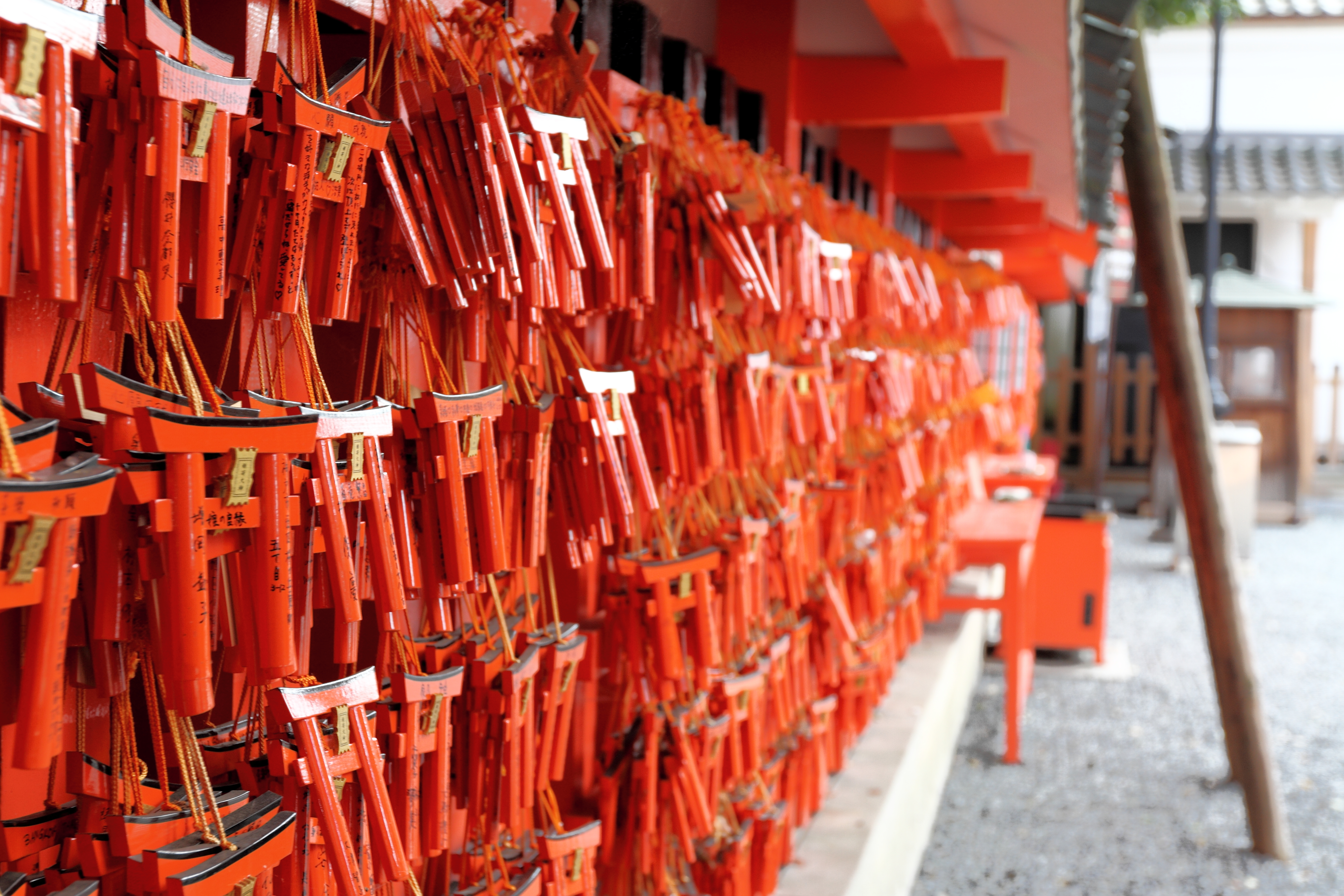 Eine Wand mit kleinen Torii im fushimi inari Schrein